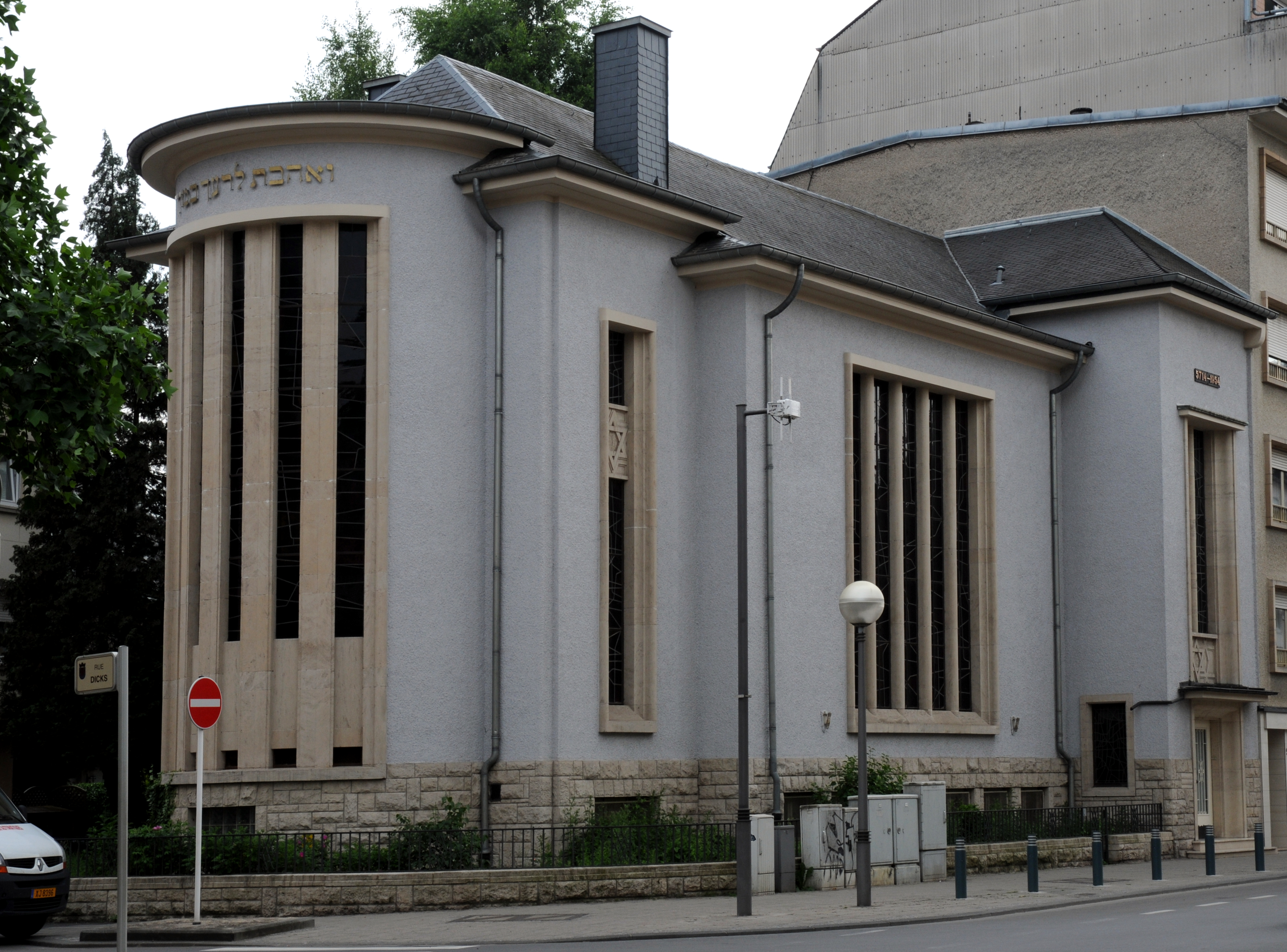 D'Synagog zu Esch.